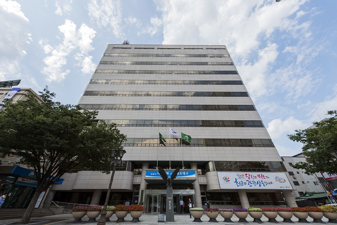 대구시청 본관 전경